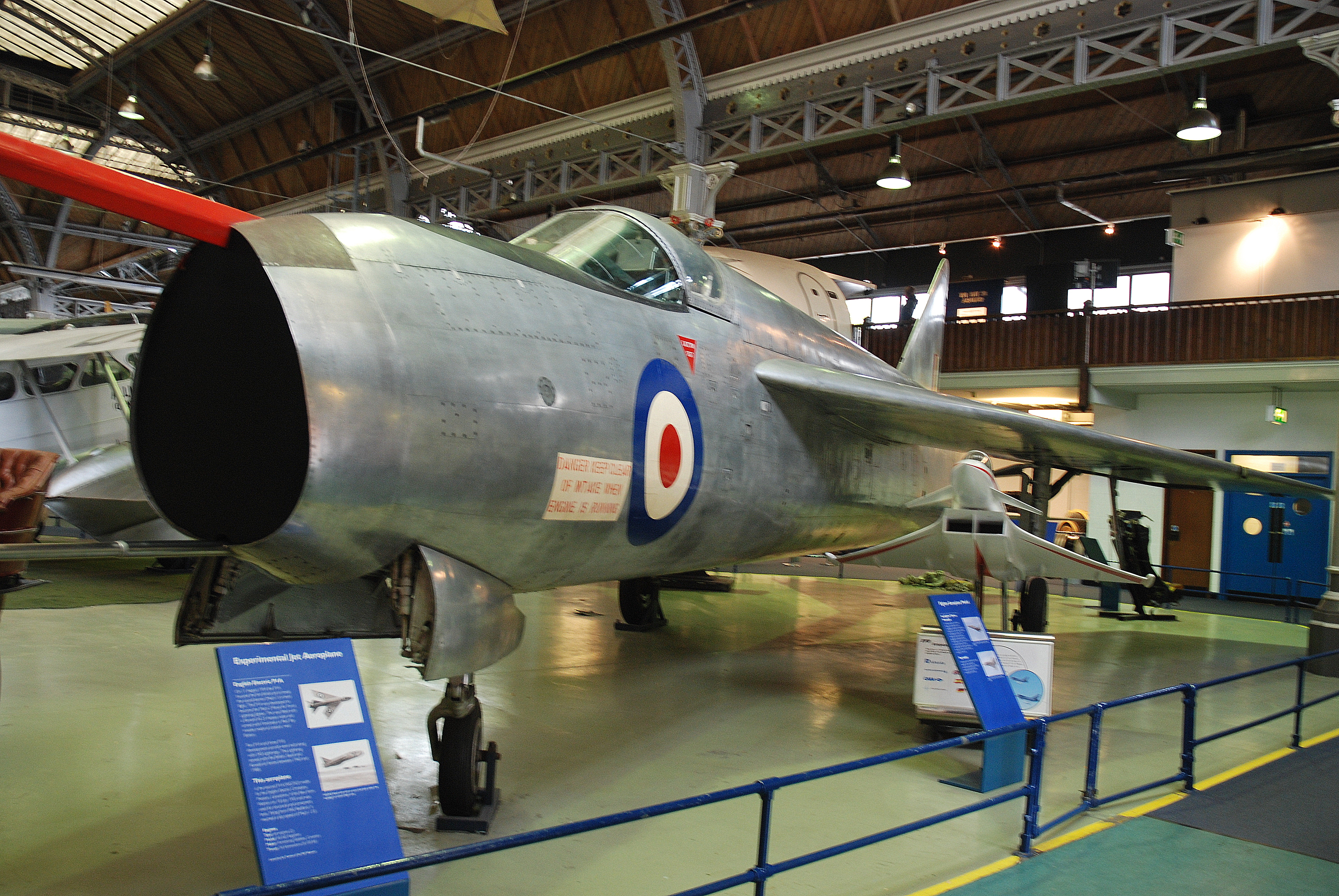 De English Electric Lightning P1A in de Air and Space Hall van het Museum of Science and Industry te Manchester, Engeland